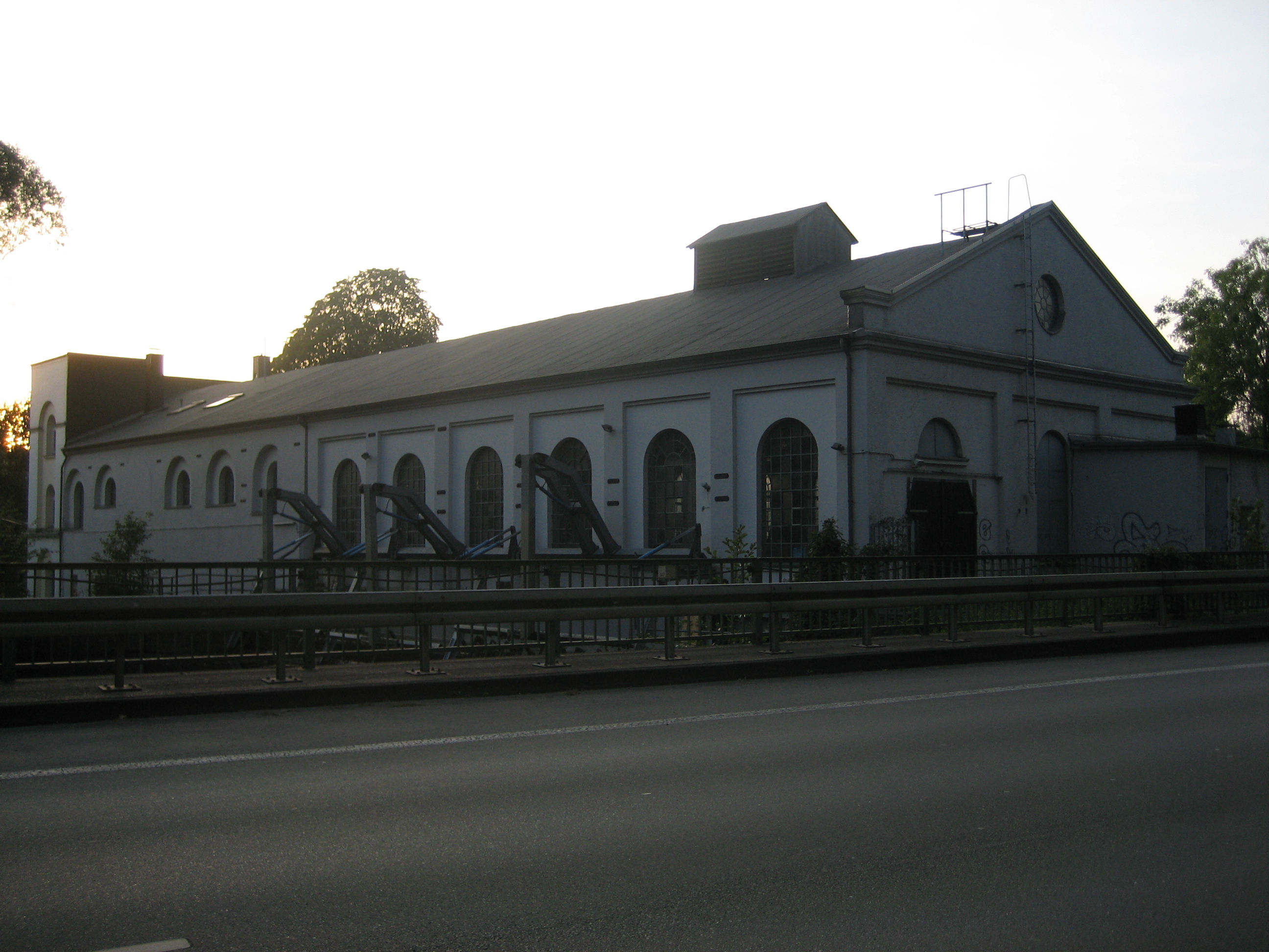 Buschmühle in Hagen This is a photograph of an architectural monument.